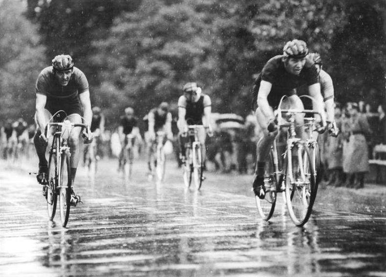 Lothar Appler, Axel Peschel Zentralbild Gahlbeck 23.6.1965 Karl-Marx-Stadt Großer Preis der 800-Jahrfeier 1965..Rund um den Schloßteich am 22.6.1965 in Karl-Marx-Stadt. Das Fahrerfeld wird von Axel Peschel (rechts), dem Sieger des Rennens angeführt, links Lothar Apbler. Bei strömenden Regen gewann der Dynamosportler Axel Peschel das Kritrium Rund und Schloßteich (86 km) in 2:07:53 st vor Vogelsang und Huster (beide SC Karl-Marx-Stadt), und errang damit den Preis der Freien Presse.